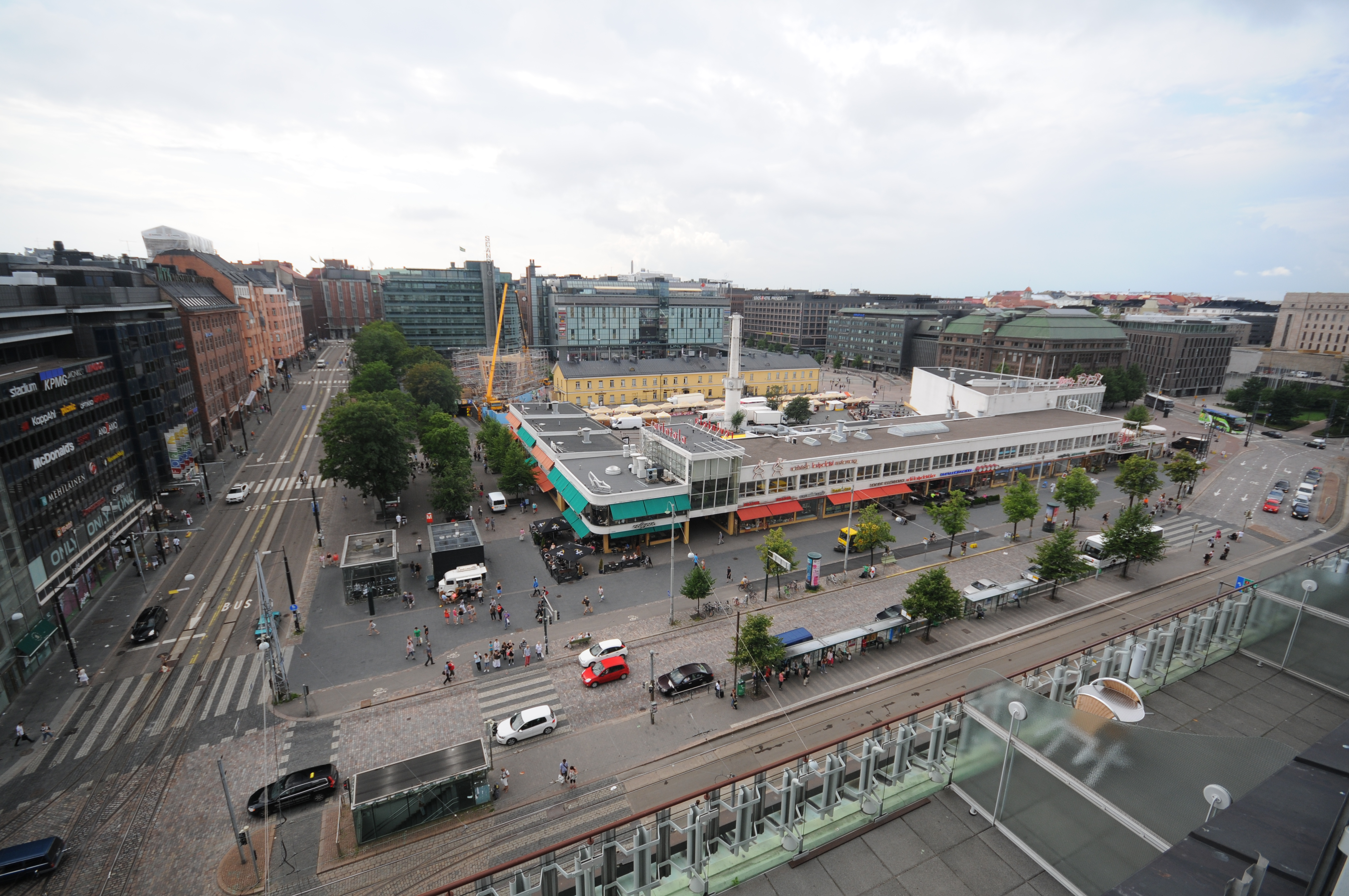 Helsinki